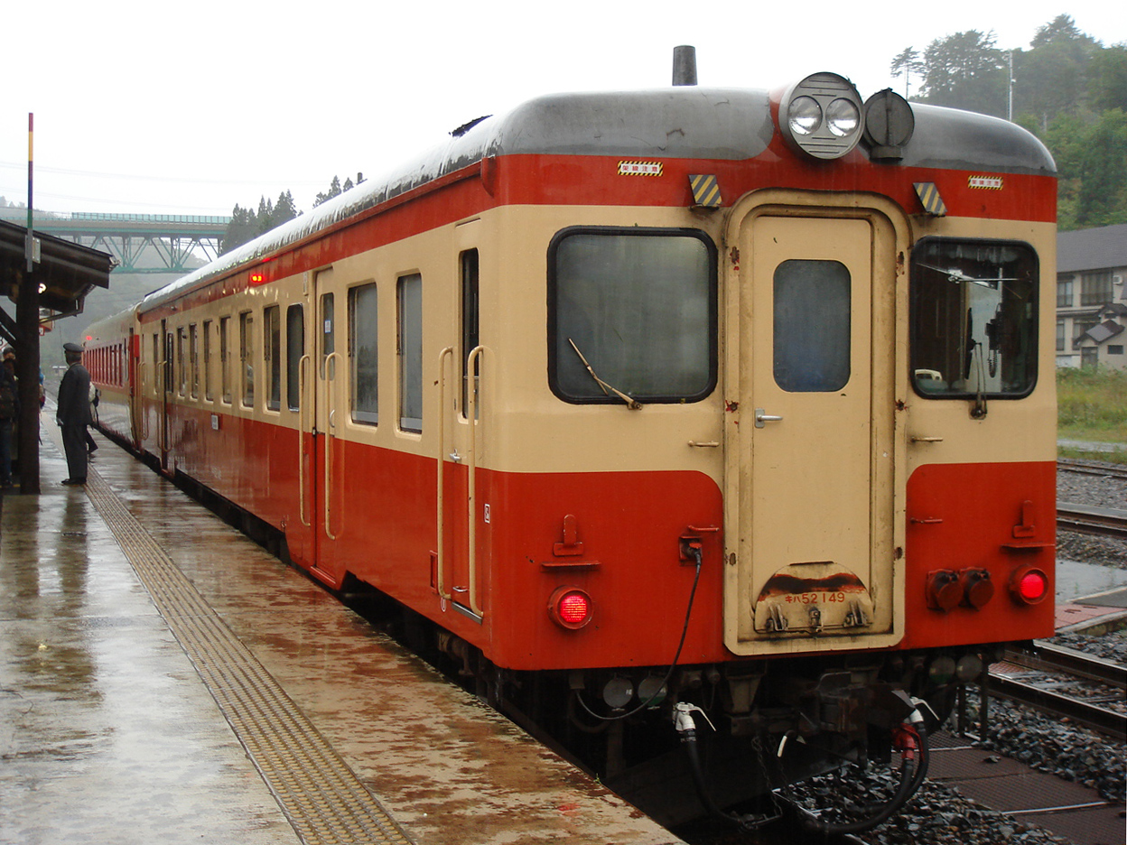 ほっとゆだ駅に停車中の横手行き臨時快速「錦秋湖号」（後部国鉄キハ52形100番台）